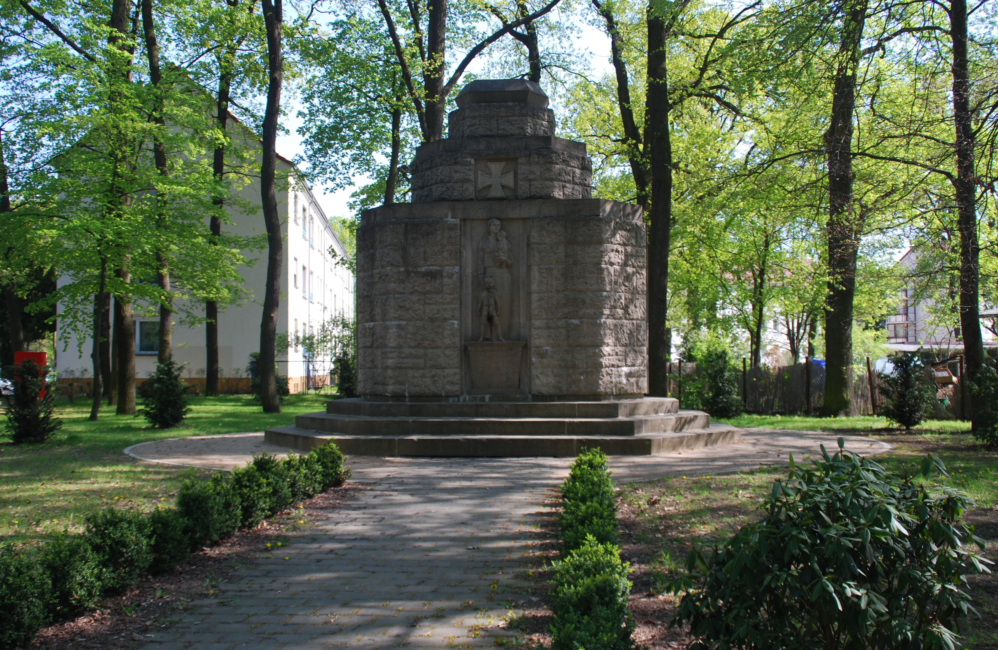 Gefallenen-Ehrenmal für die im Ersten Weltkrieg gefallenen Soldaten in Erkner bei Berlin; erbaut 1928; unter Denkmalschutz